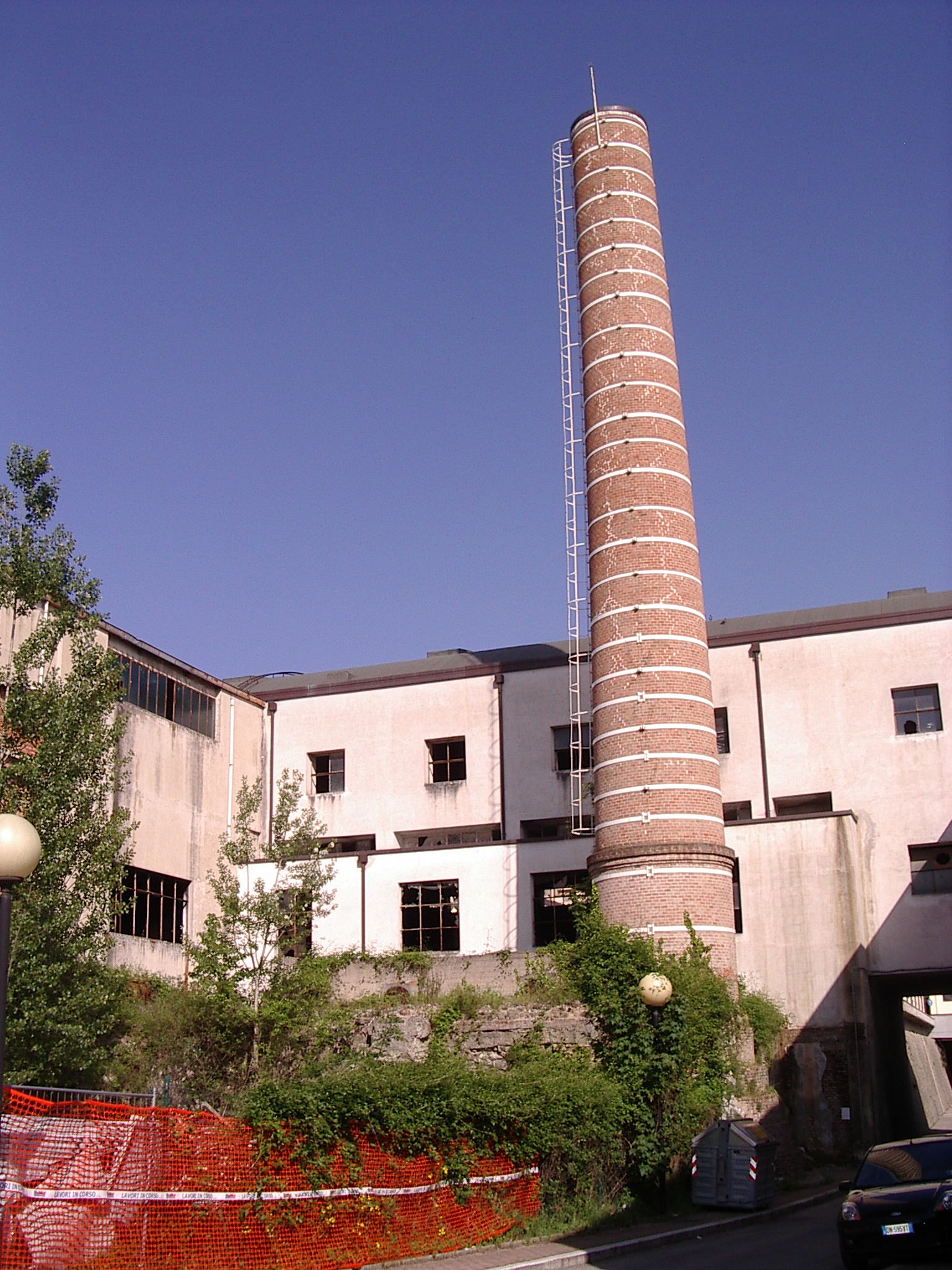 Vestiges Usine Buitono Sansepolcro Toscane Italy